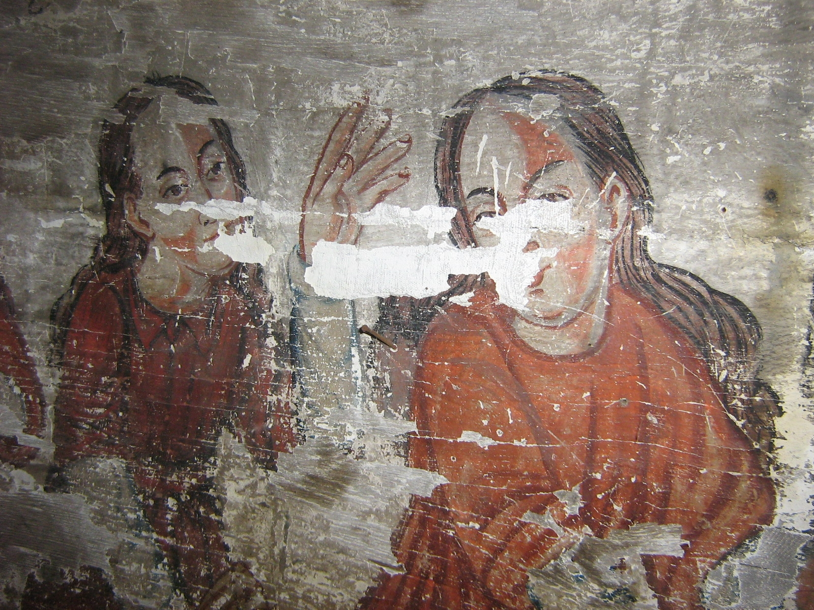 Fragment de pictură murală în biserica de lemn din Creaca, atribuită lui Ion Pop din Românaşi.